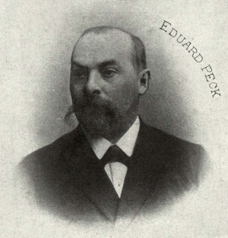 Portrét – Eduard Peck (1857 - 1931), Český historik.